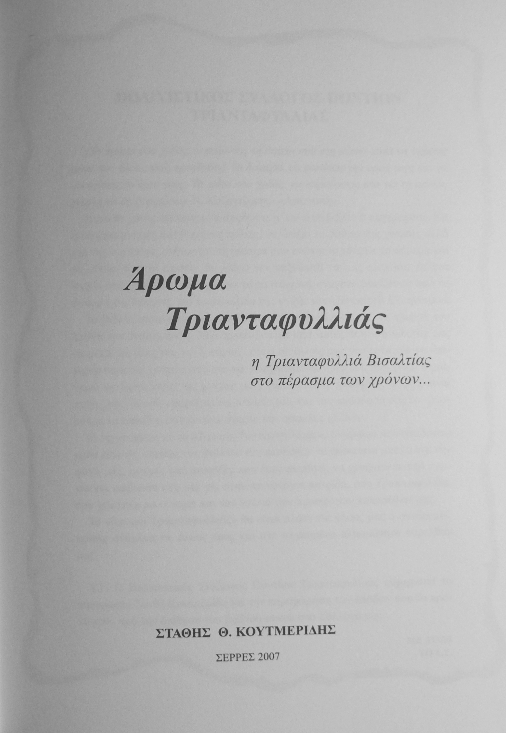 άρωμα Τριανταφυλλιάς, εξώφυλλο, εισαγωγή